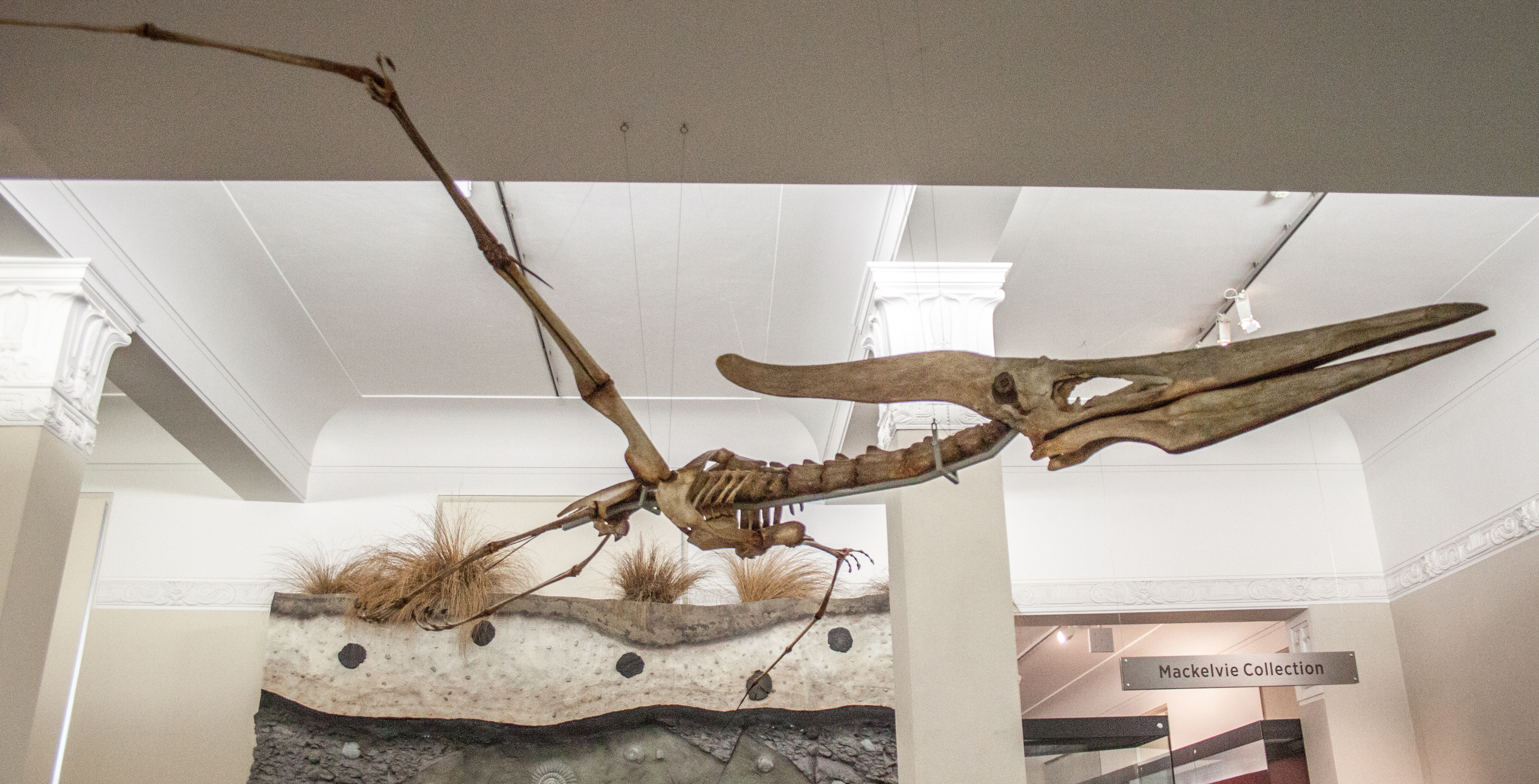 Auckland War Memorial Museum, Pterosaurlabel QS:Len,"Auckland War Memorial Museum, Pterosaur" label QS:Lhu,"Pteroszaurusz"